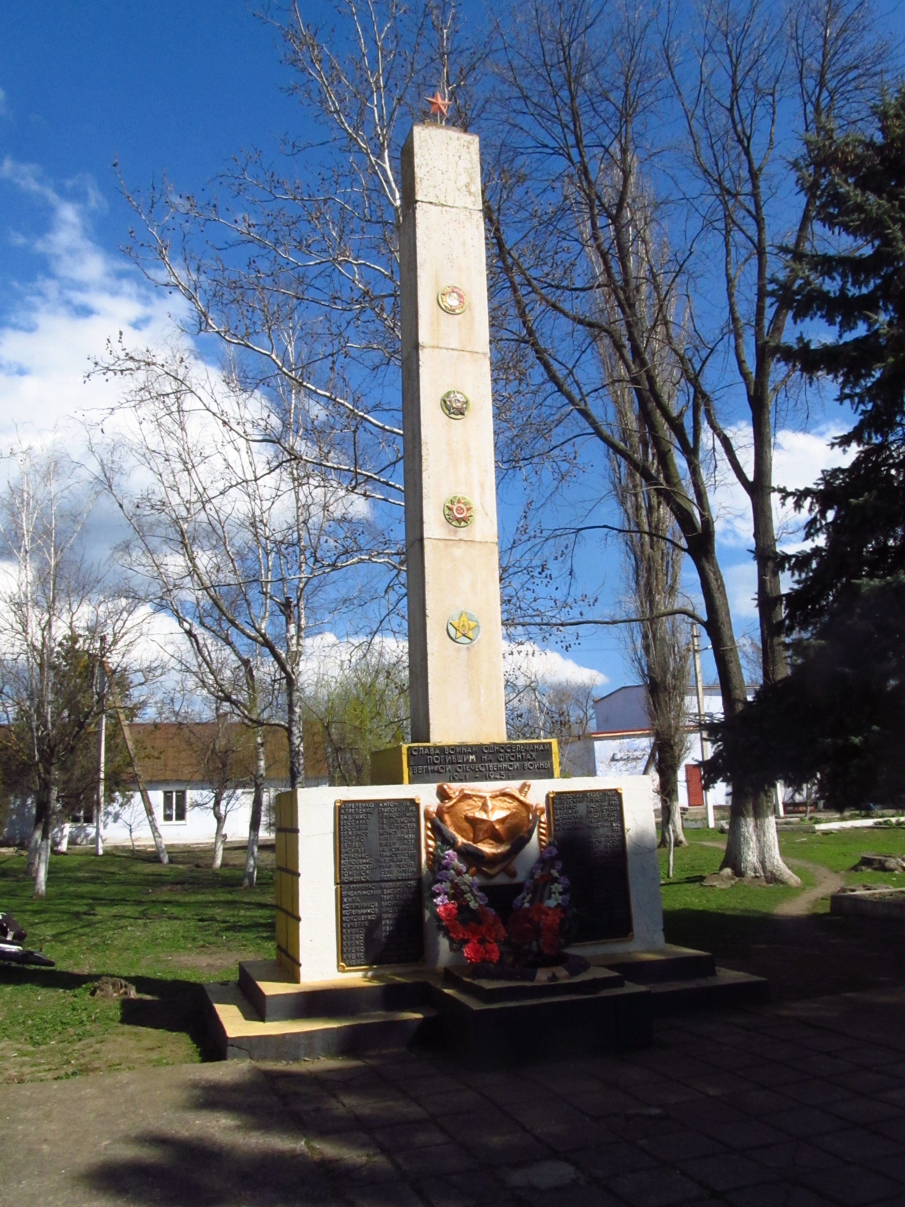 Пам’ятник воїнам-односельцям, Барабой, центр села